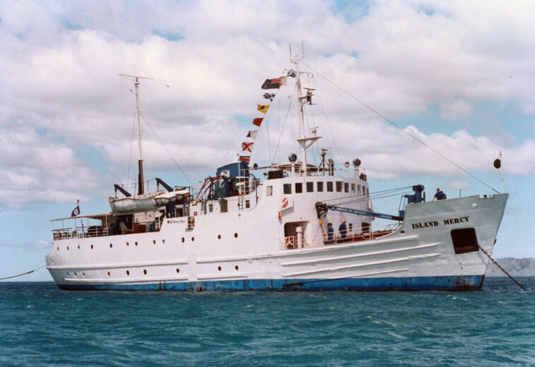 Die Island Mercy